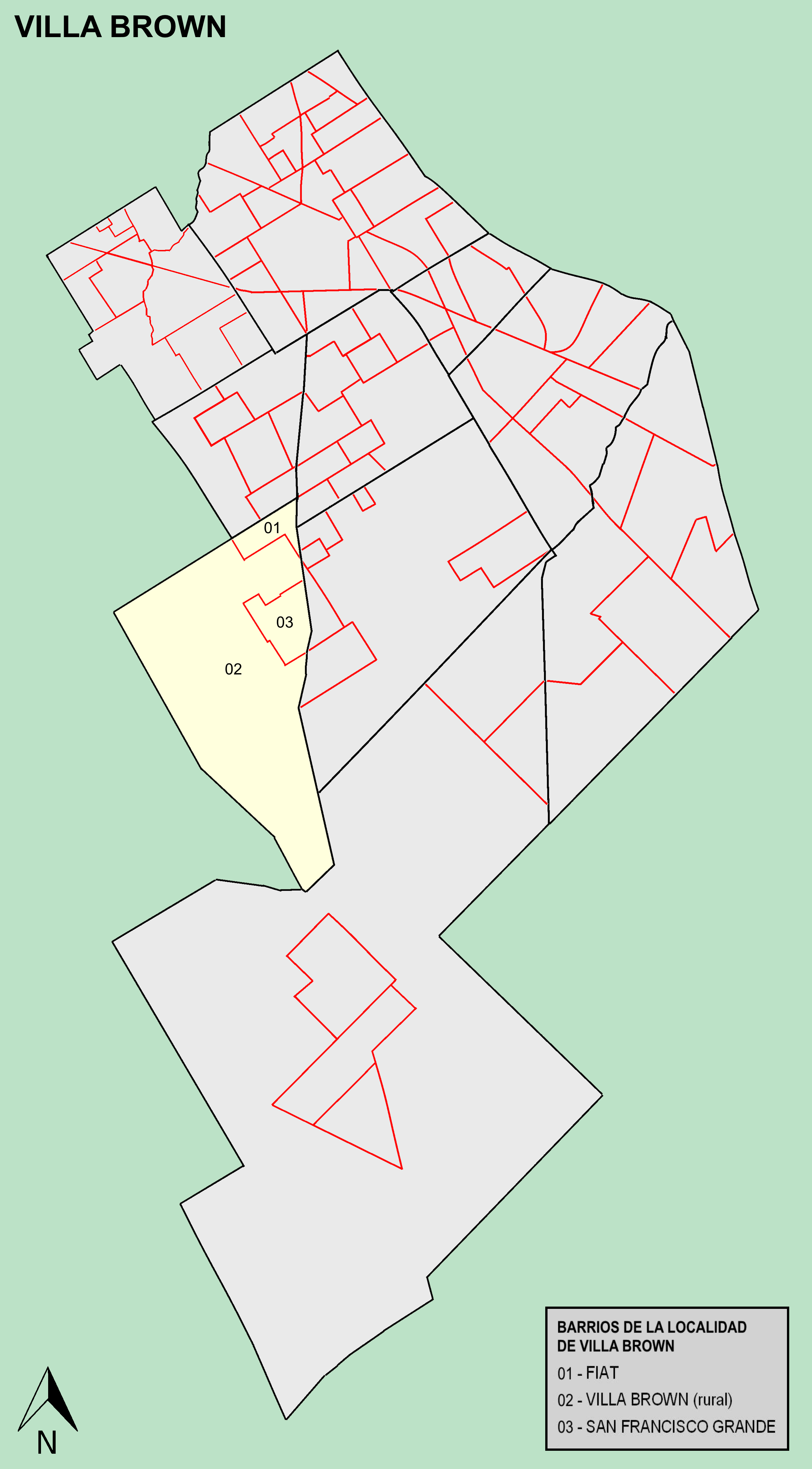 Mapa barrios de Villa Brown